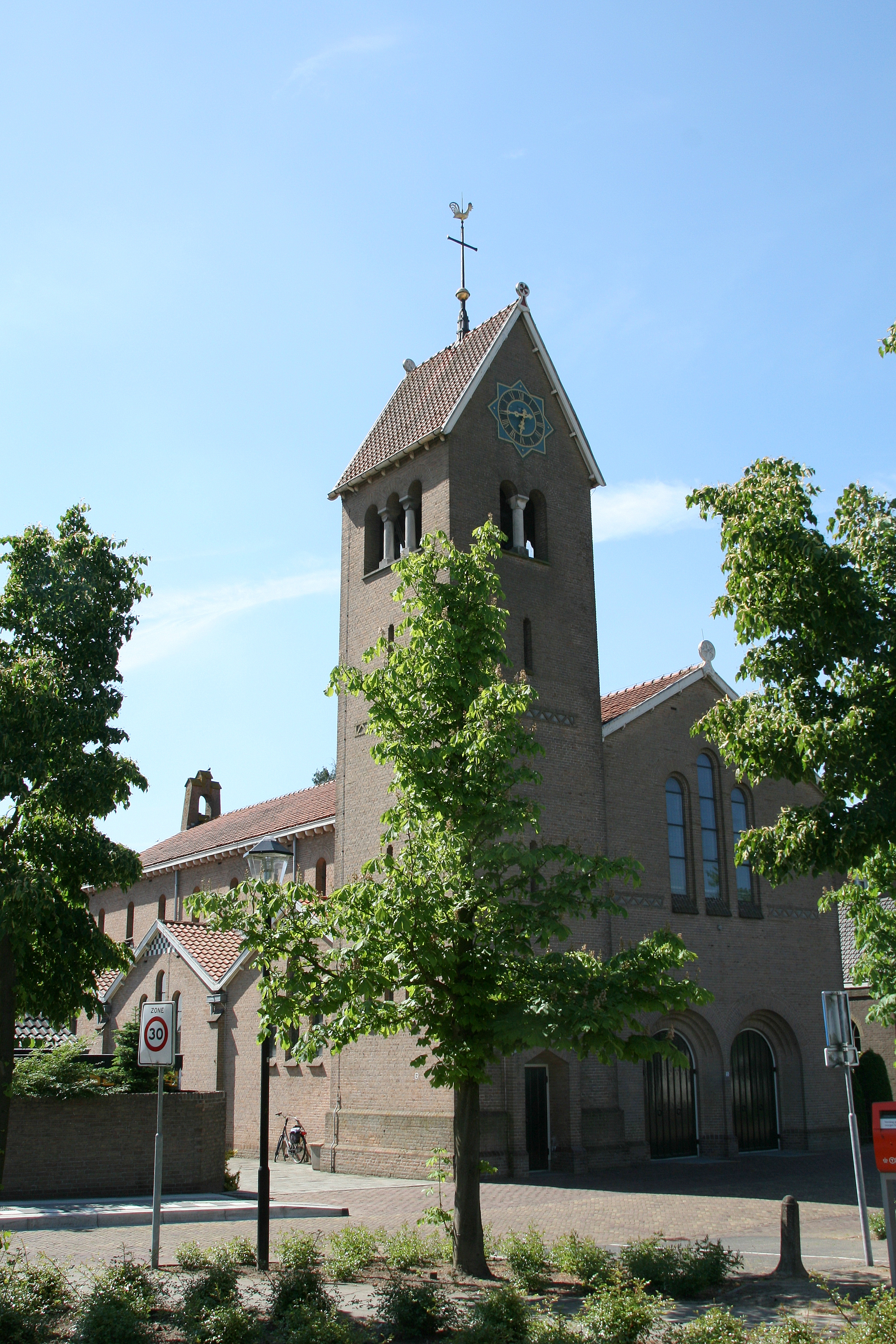 De Sint-Willibrorduskerk uit 1911, werd in neoromaanse stijl ontworpen door architect Jan Stuyt, in samenwerking met Joseph Cuypers. In deze kerk werd de reeds eerder gebouwde Sint-Antoniuskapel opgenomen.